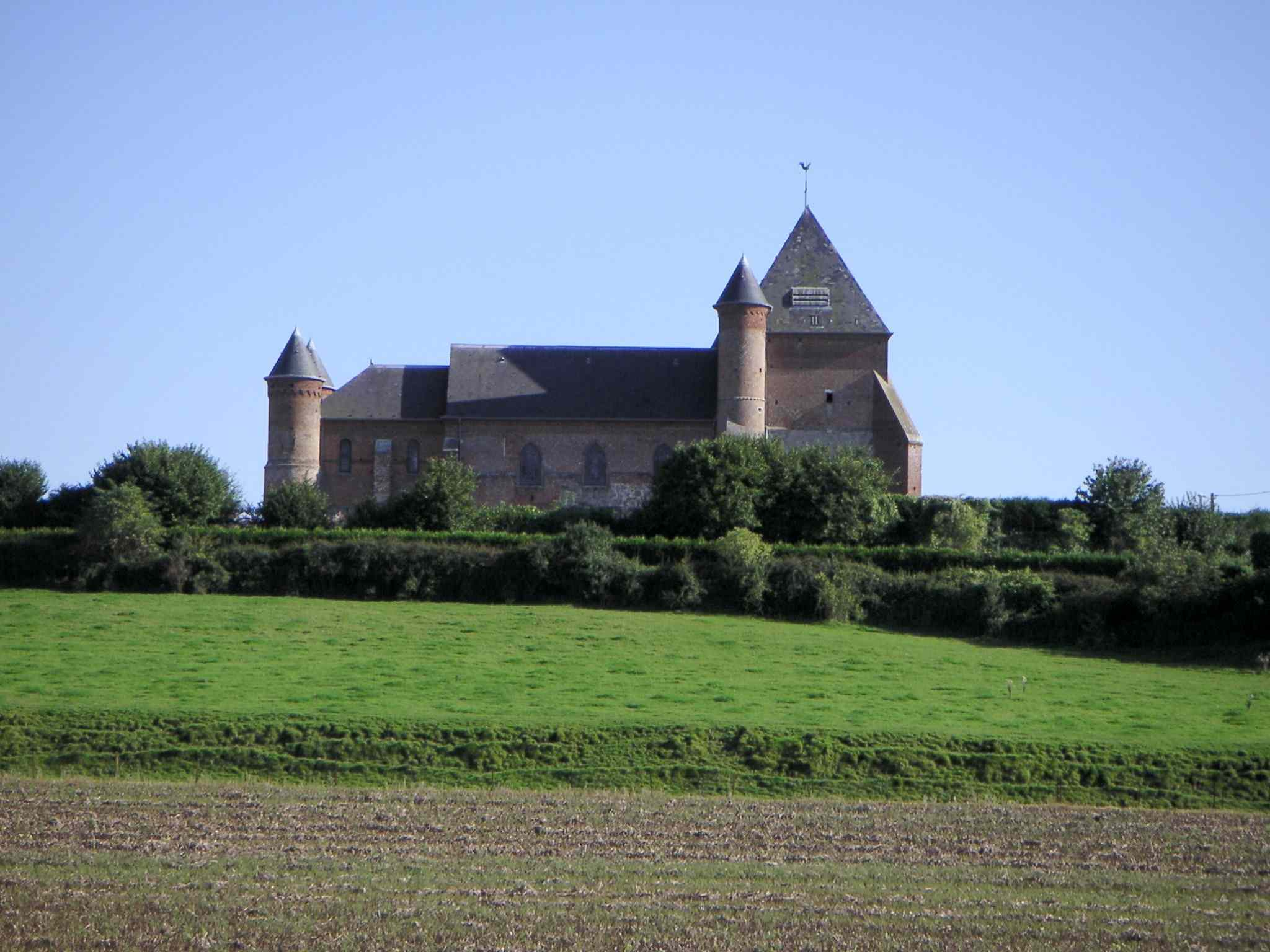 Cette photo de l'église fortifiée de Beaurain (commune de Flavigny-le-Grand-et-Beaurain dans la vallée de l'Oise près de Guise, a été prise par User:LonganimE le 30 août 2005.